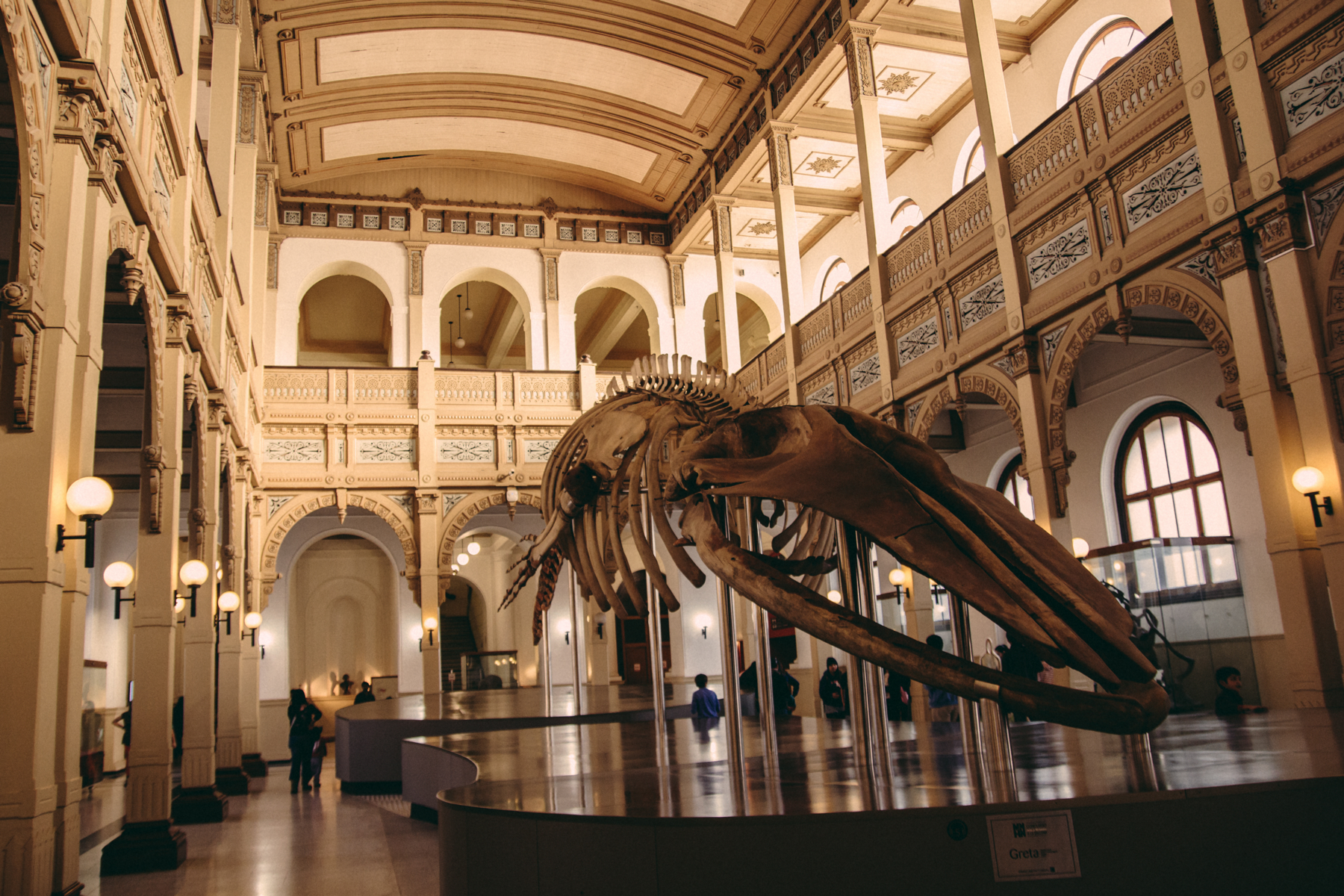 Museo Nacional de Historia Natural, Santiago, Chile